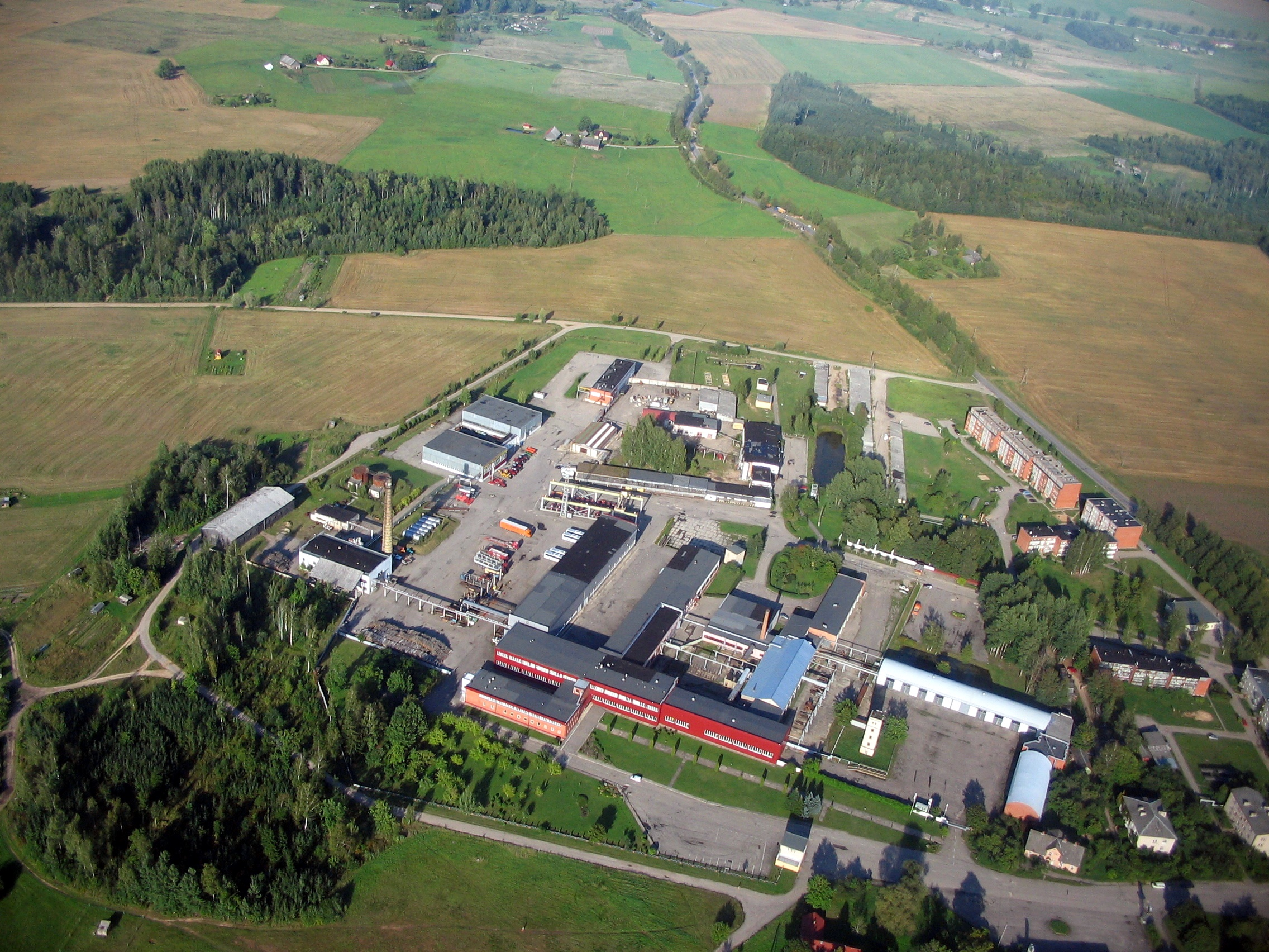 Šķieneri no augšas